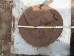 Ausbreitmaß von Flüssigboden auf einem Ausbreittisch